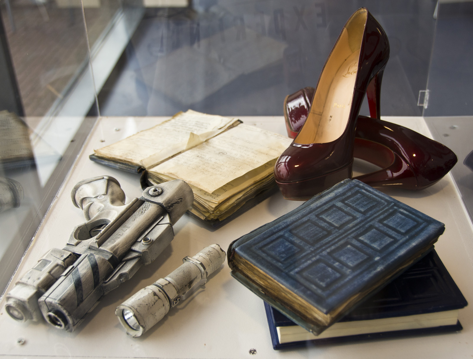 Spoilers!